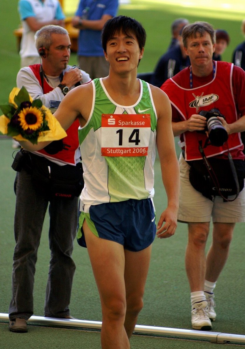 Sieger der 110m Hürden bei Welffinale in Stuttgart 2006